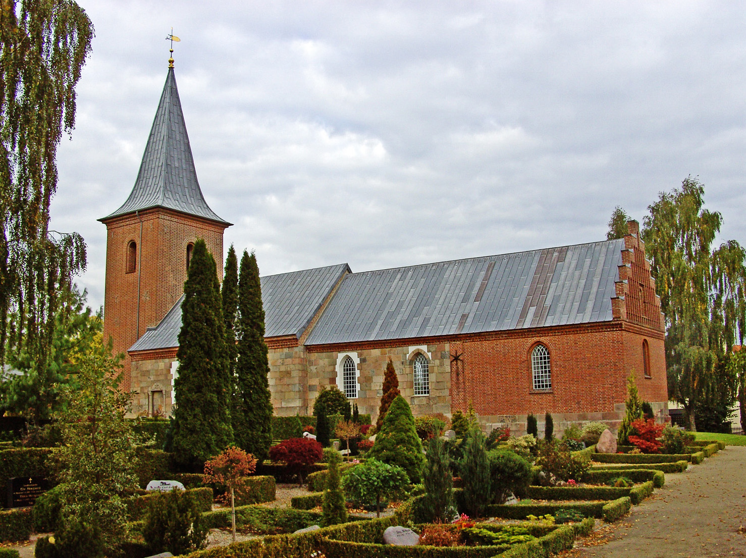 fra sydøst